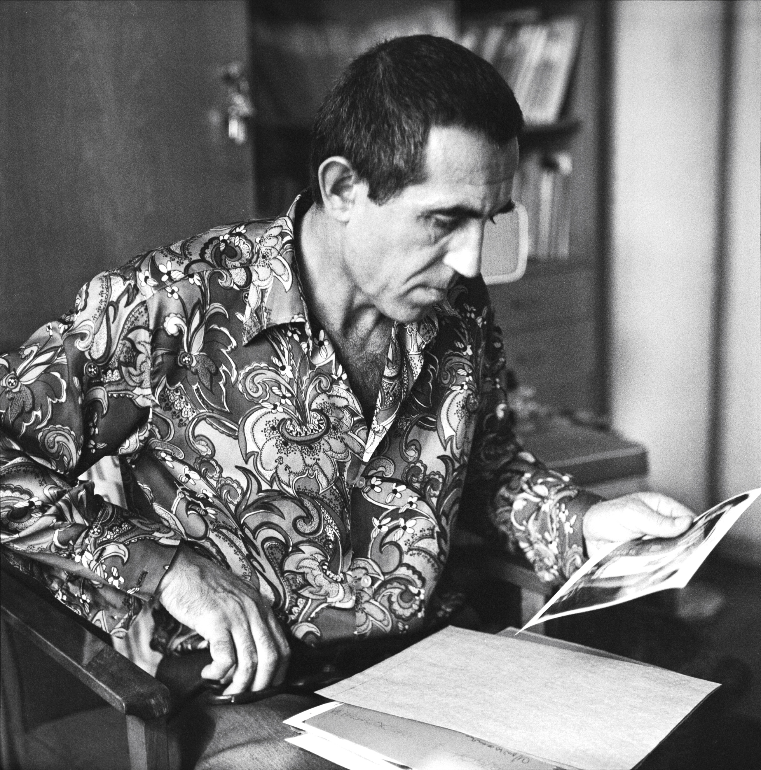 Tadeusz Drankowski, fotoreporter